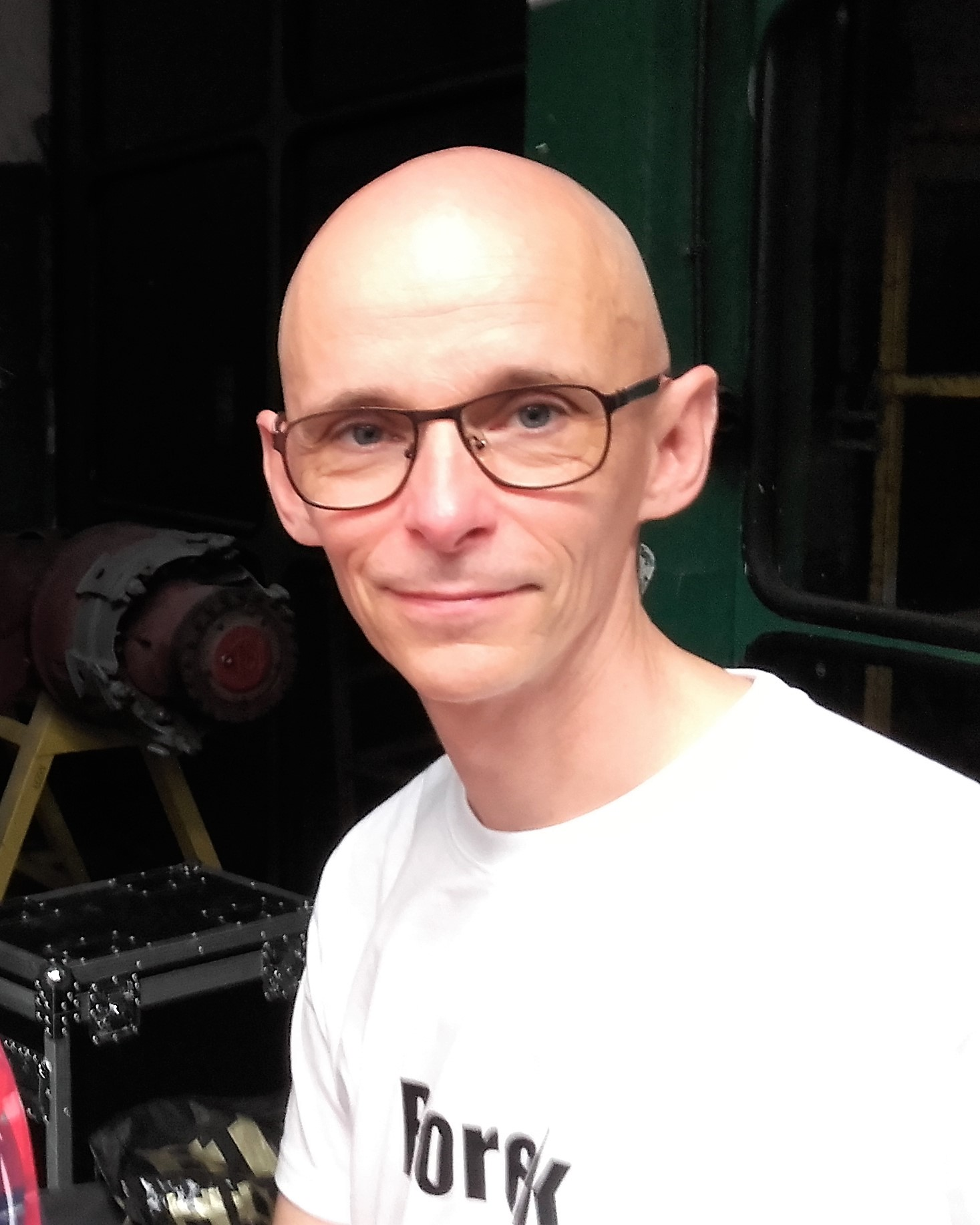 Marcin Borkowski podczas Pixel Heaven 2017, 27 maja 2017 roku, Warszawa